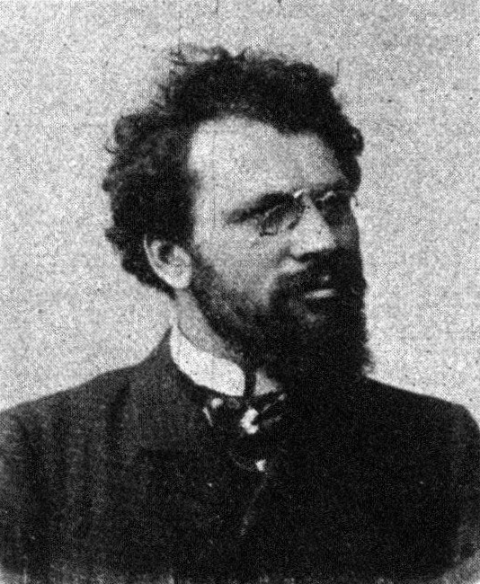 Österreichischer Politiker, Reichsratswahl 1907, Name siehe Dateiname